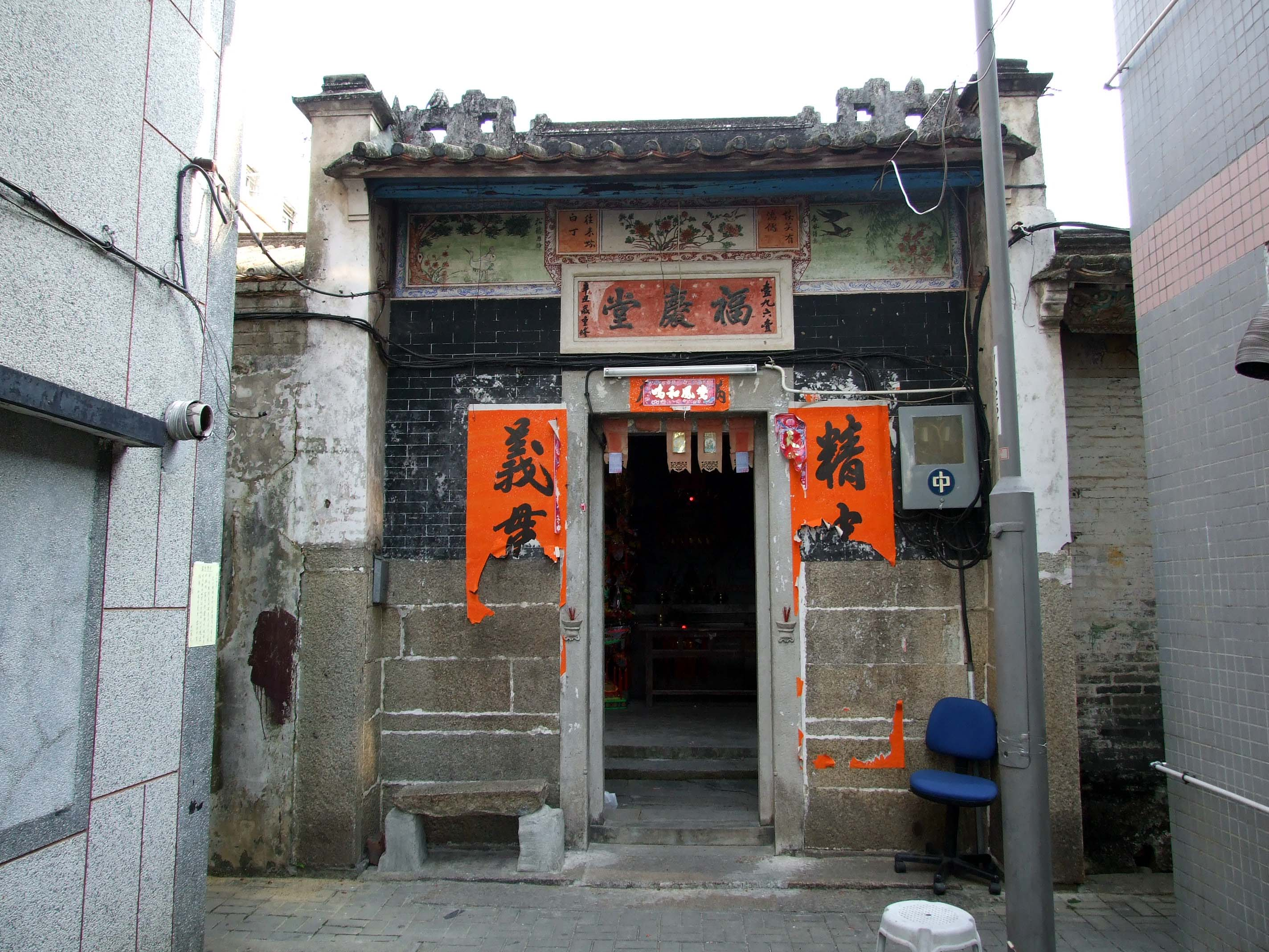 中文（香港）: 朗十八鄉水蕉新村福慶堂(神廳)